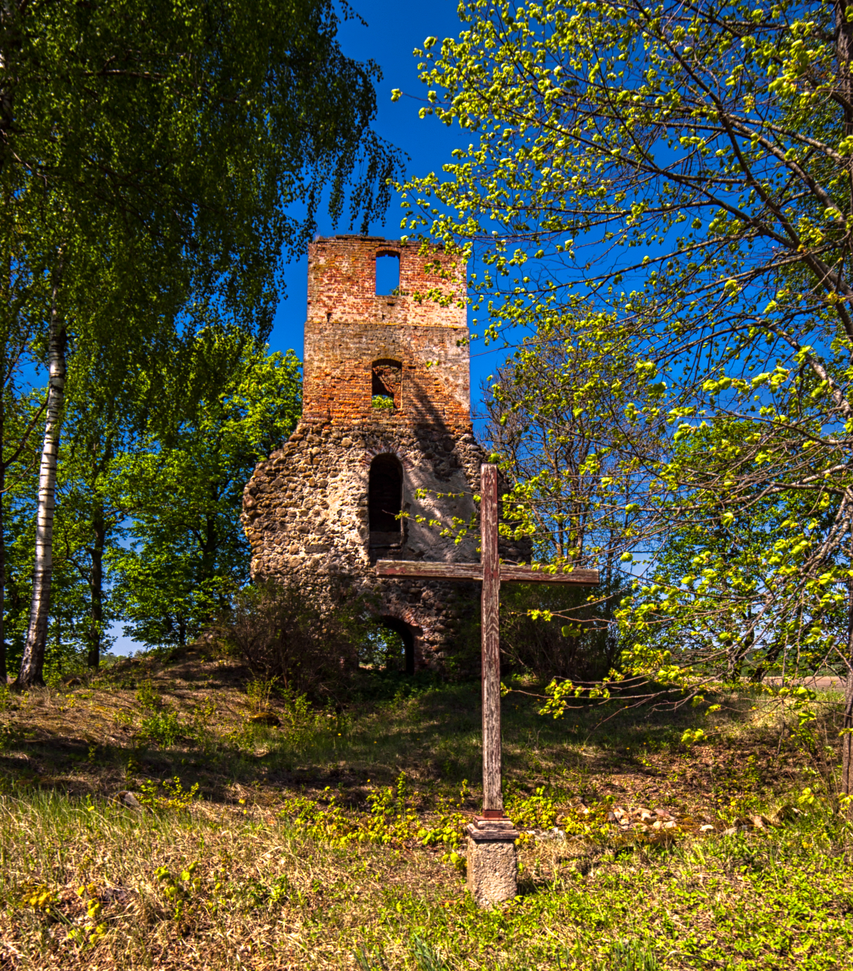 Jaunauces luteriskās baznīcas drupas